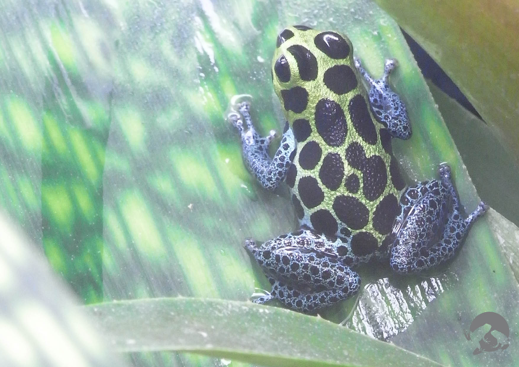 R. imitator "Alto Cainarachi", weibliches, ausgewachsenes Tier